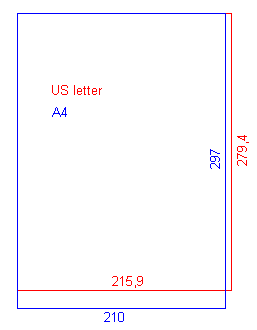 Vergelijking papierformaat A4 en US Letter (zelf gemaakt)